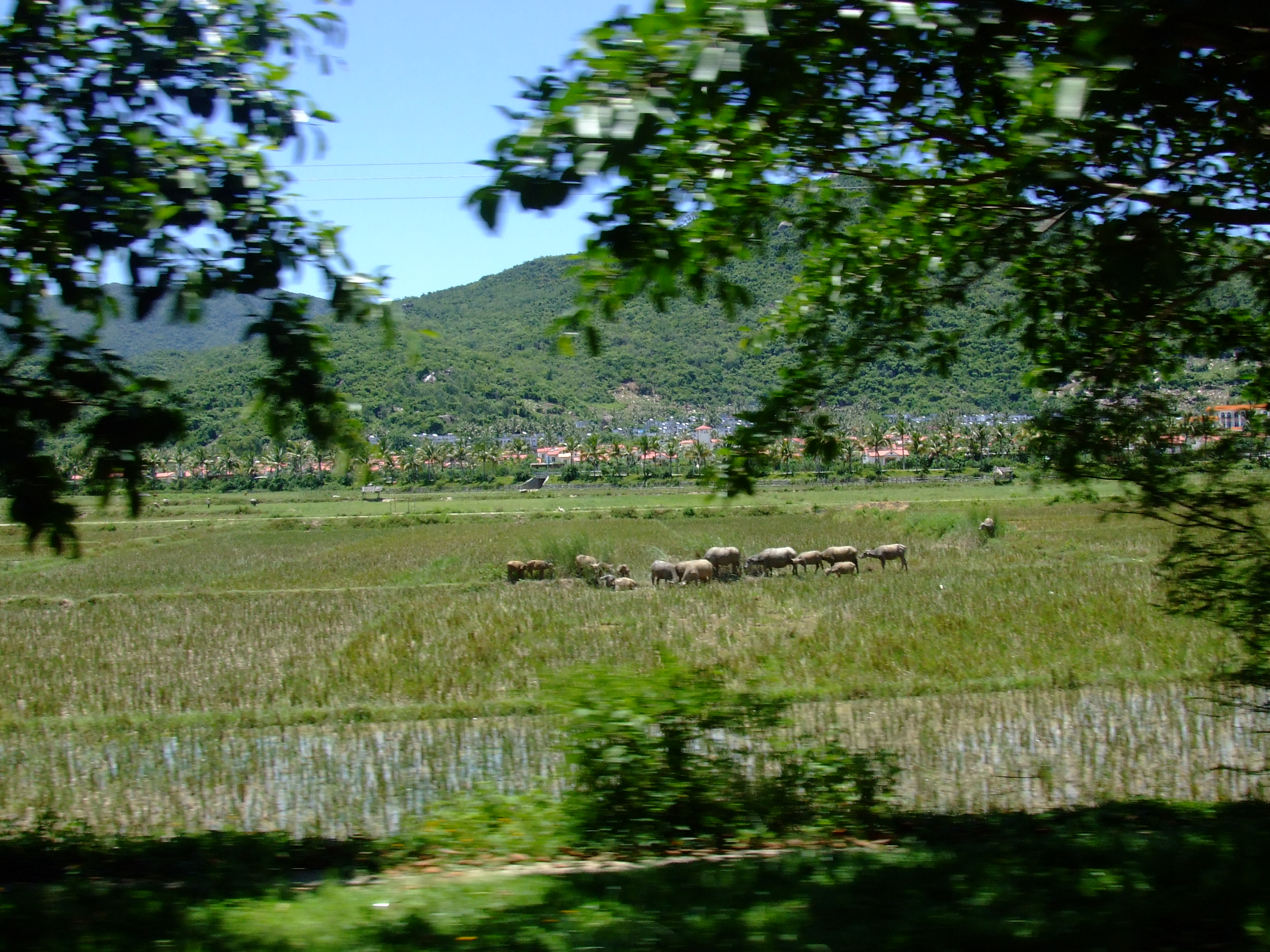 Vannbøfler langs veien